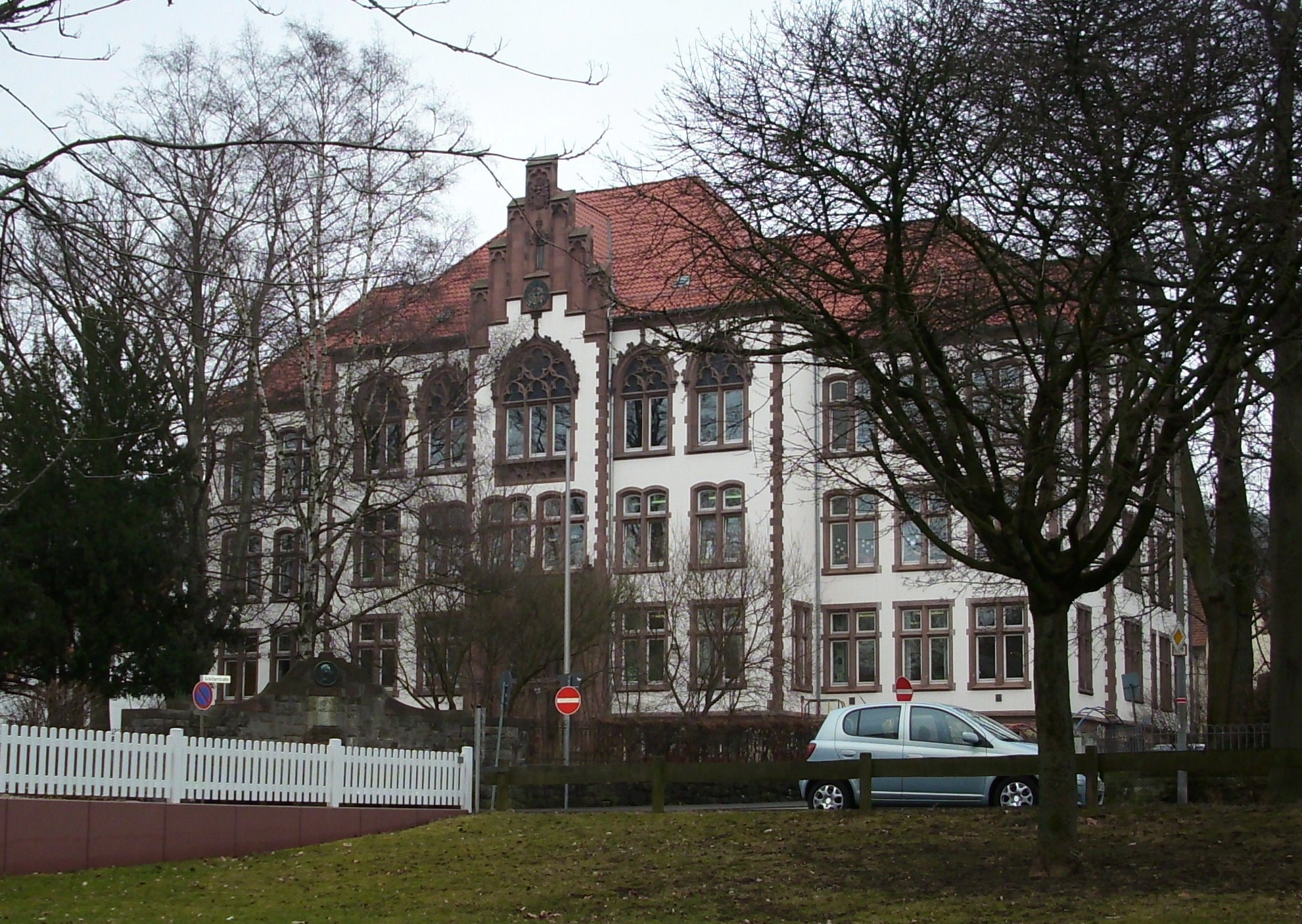 Die Martin-Luther-Schule in Northeim. Bis in die 1970er Jahre Gebäude des Gymnasium Corvininaum (Jungengymnasium).